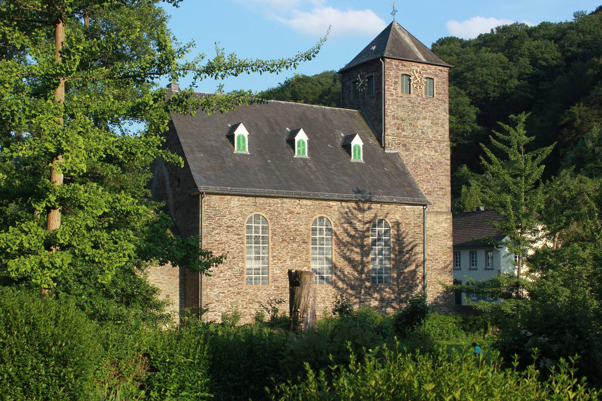 Müngstener Straße, Solingen-Burg, aufgenommen im Sommer 2015